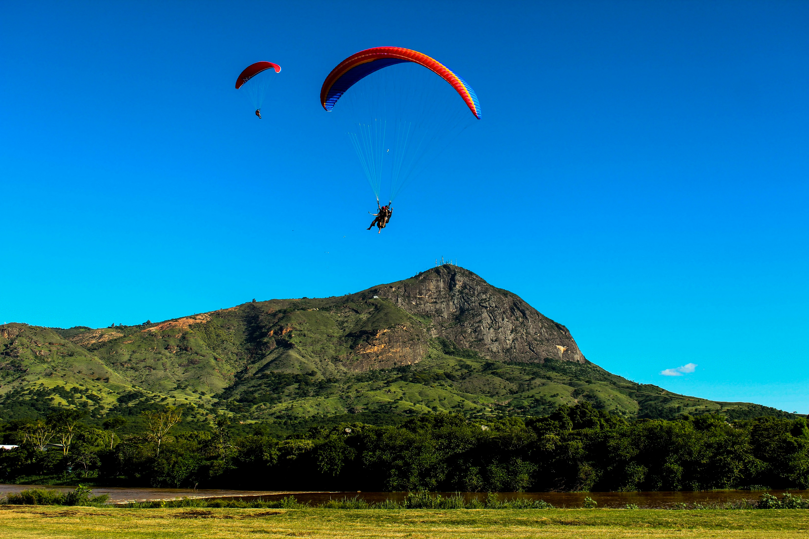 Pico do Ibituruna, paisagem natural de Governador Valadares. No pico estão pousadas, clube, condomínios e também possui rampa para a prática de Voo Livre, atividade deportiva muito praticada na cidade. A Ibituruna também é utilizada para campeonatos nacionais e internacionais desta modalidade.